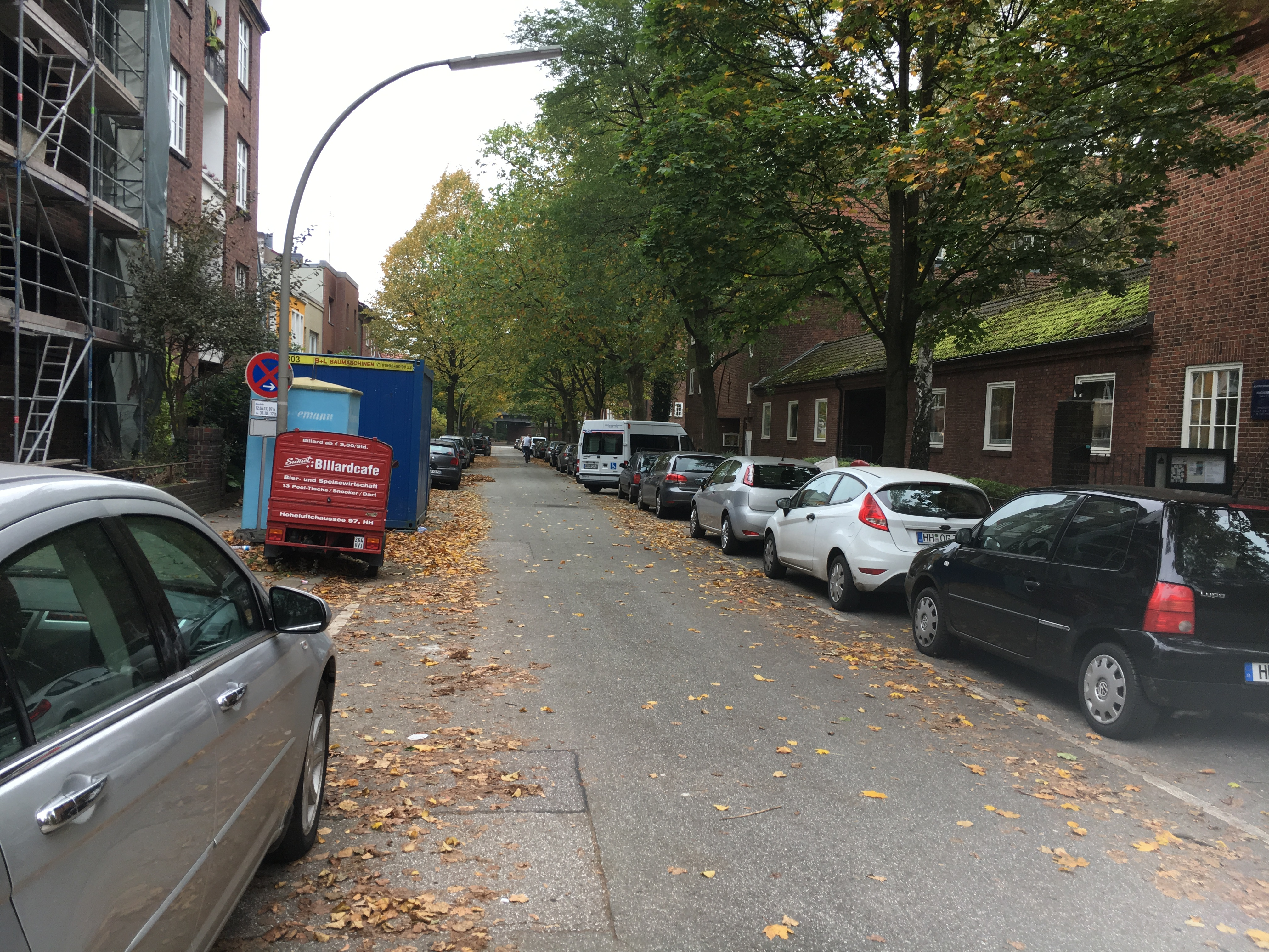 Tieloh, Blick Richtung Habichtstraße, rechts das Gemeindehaus der Auferstehungskirche